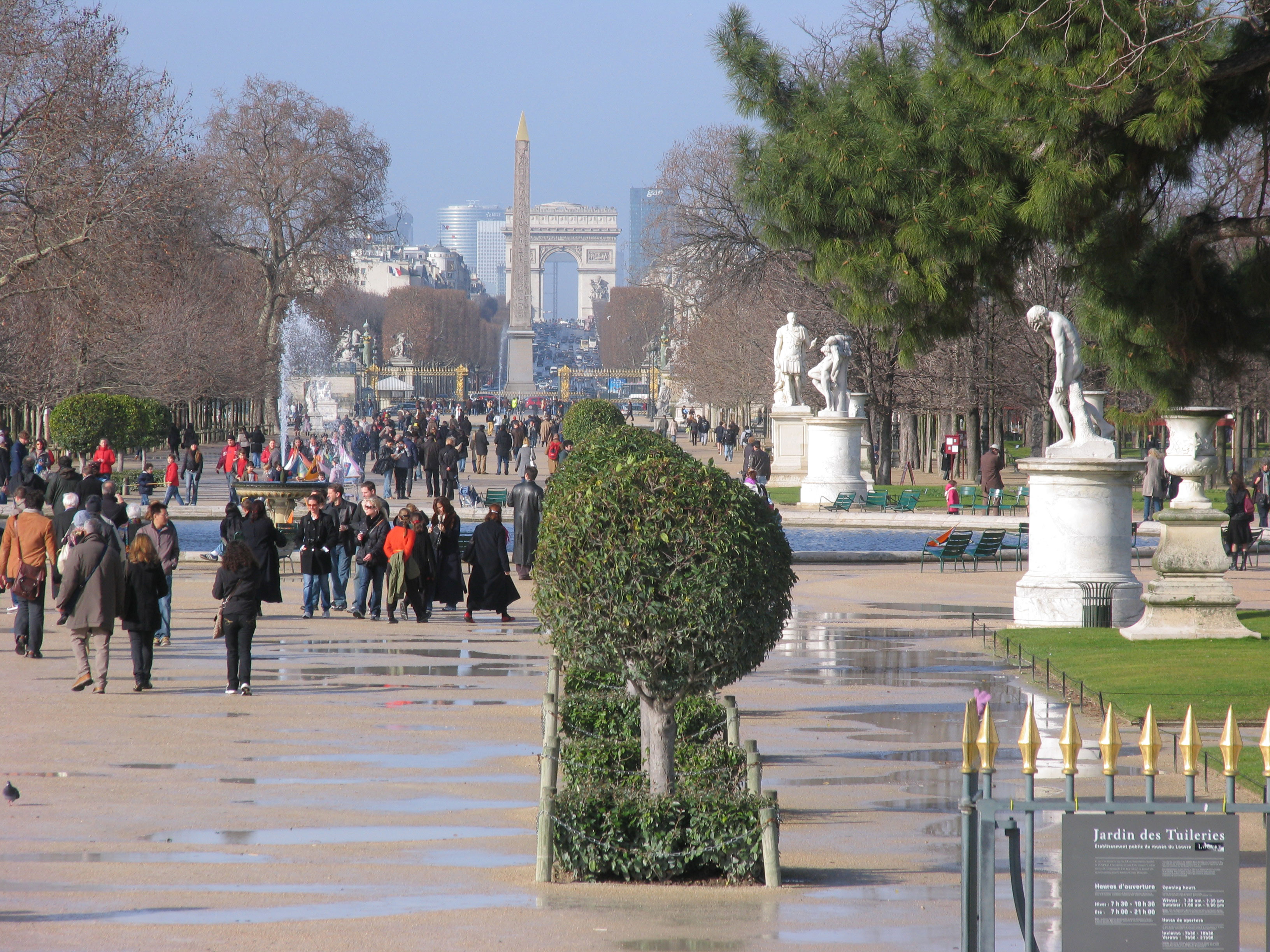 Jardin des Tuileries, Paris, France. En arrière plan la place de la Concorde avec l'obélisque, les Champs Elysées, l'Arc de Triomphe et au fond les gratte-ciels du quartier de La Défense